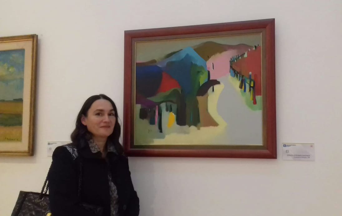 Јована Поповић Бенишек академска сликарка и ликовни педагог